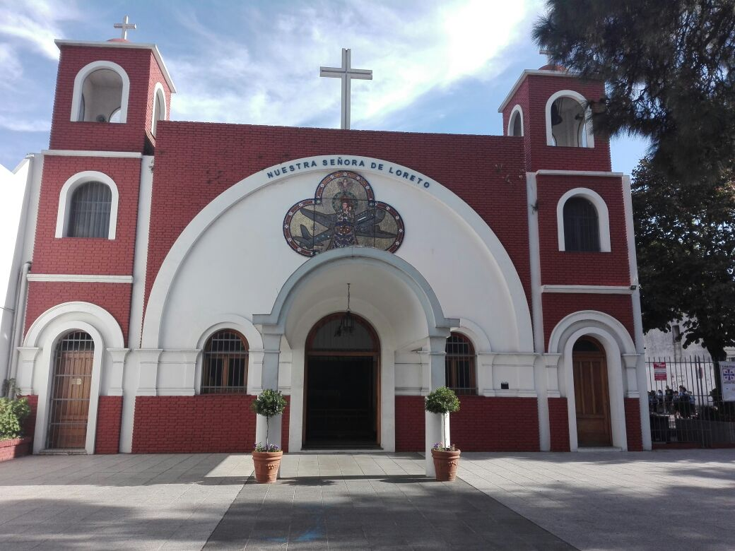 Iglesia del Loreto